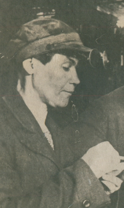 фотография Ольги Кузминичны Ковалёвой первой советской женщины-сталевара, одной из первых советских женщин-трактористов, бойца Сталинградского народного ополчения, погибшей при обороне Сталинграда в 1942 году. Увековечена мемориальной плитой на Большой братской могиле на Мамаевом кургане.